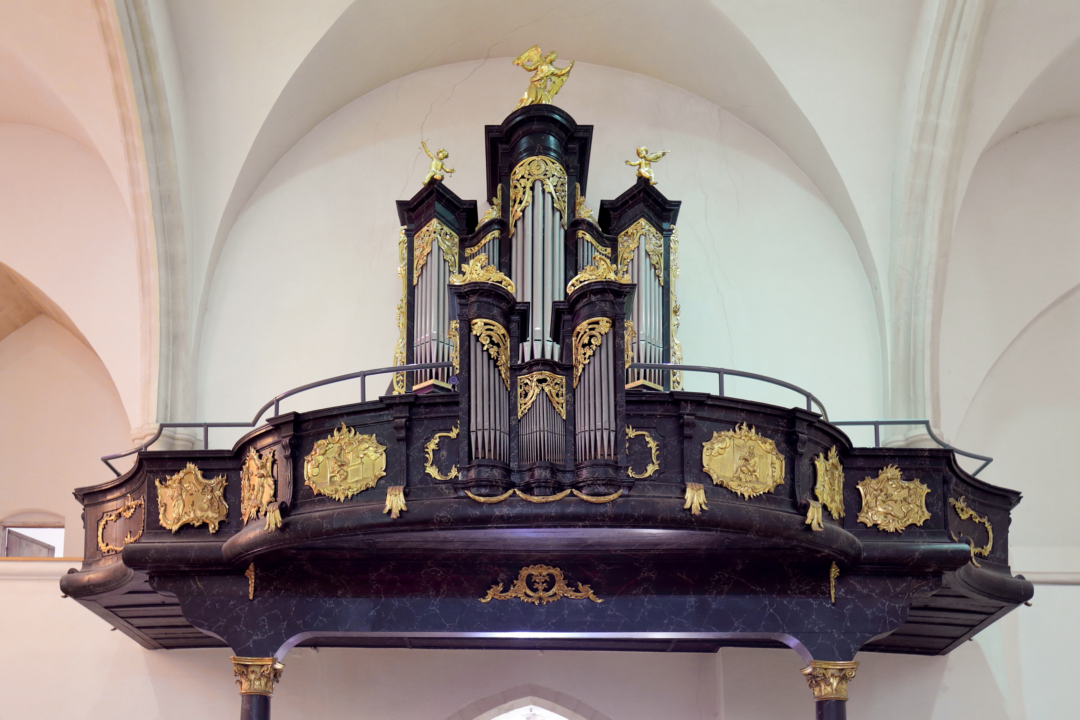 Orgel mit Empore im Dom St. Martin in der burgenländischen Landeshauptstadt Eisenstadt. Die Orgel ist ein Werk von dem Wiener Orgelbauer Gottfried Malleck aus dem Jahr 1778.